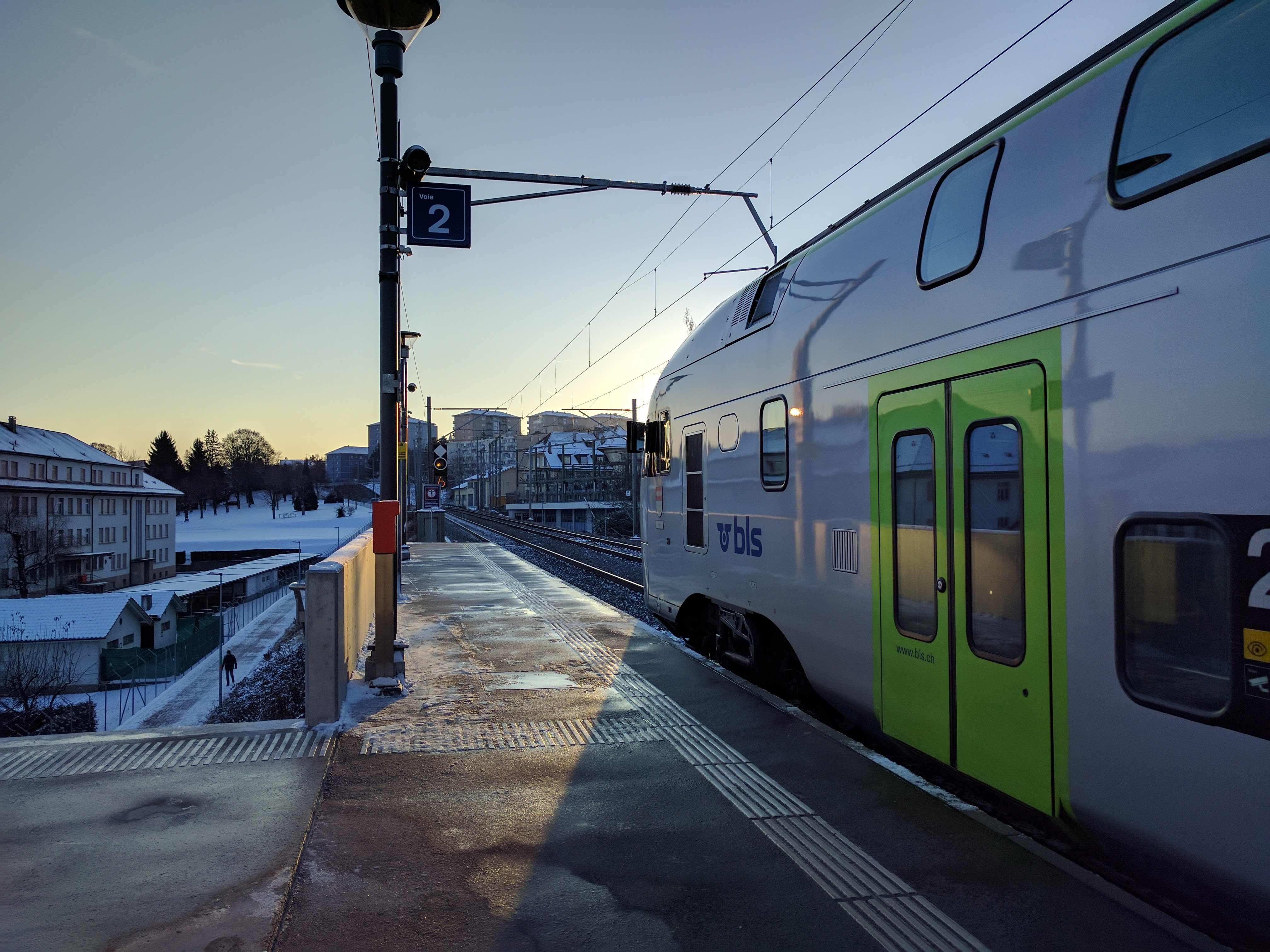 BLS Stadler Kiss on a S1 service of the S-Bahn Bern